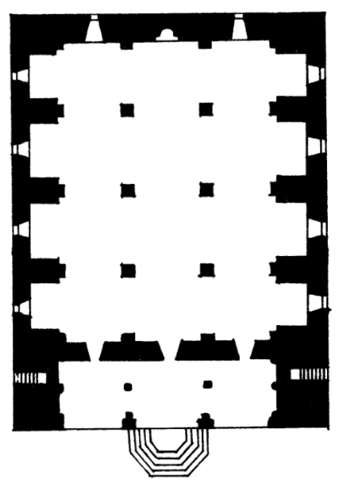 Yuxarı Gövhərağa məscidinin planı